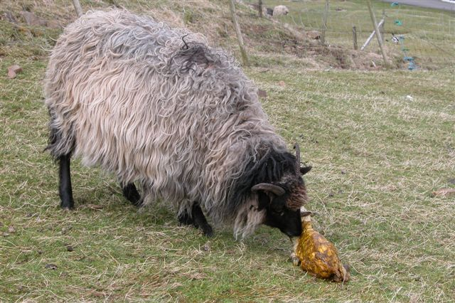 Faroesheeps